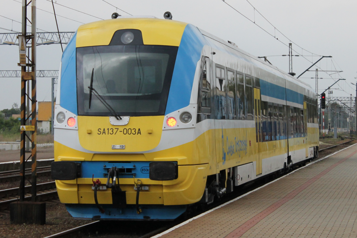 Spalinowy zespół trakcyjny SA137-003 na stacji w Tarnowie. This photo was taken during Railway Wikiexpedition 2014 set up by Wikimedia Polska Association in cooperation with Fundacja Grupy PKP. You can see all photographs in category Wikiekspedycja kolejowa 2014.